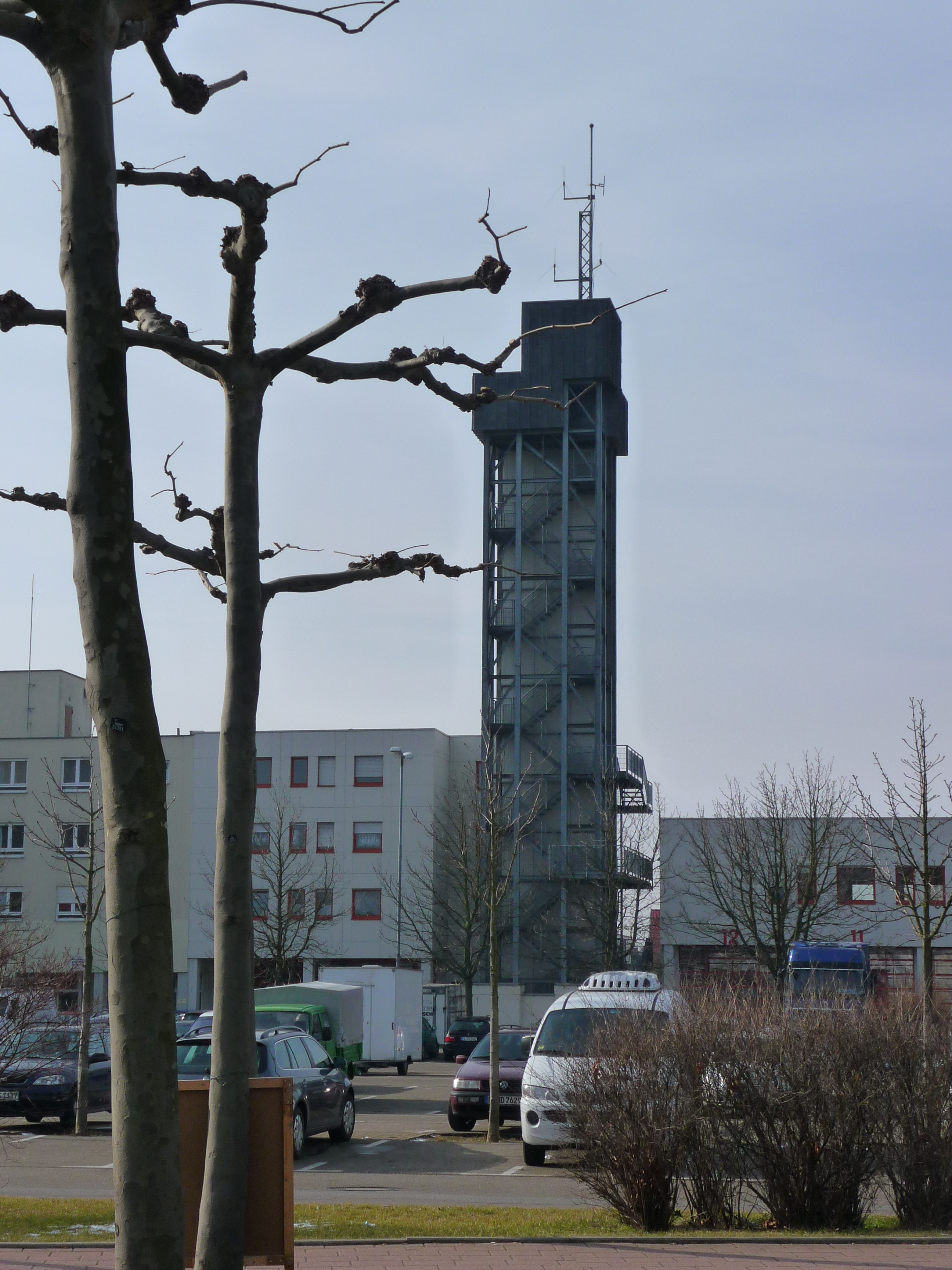 Schlauchturm der Feuerwehr in Schwetzingen am Neuen Messplatz